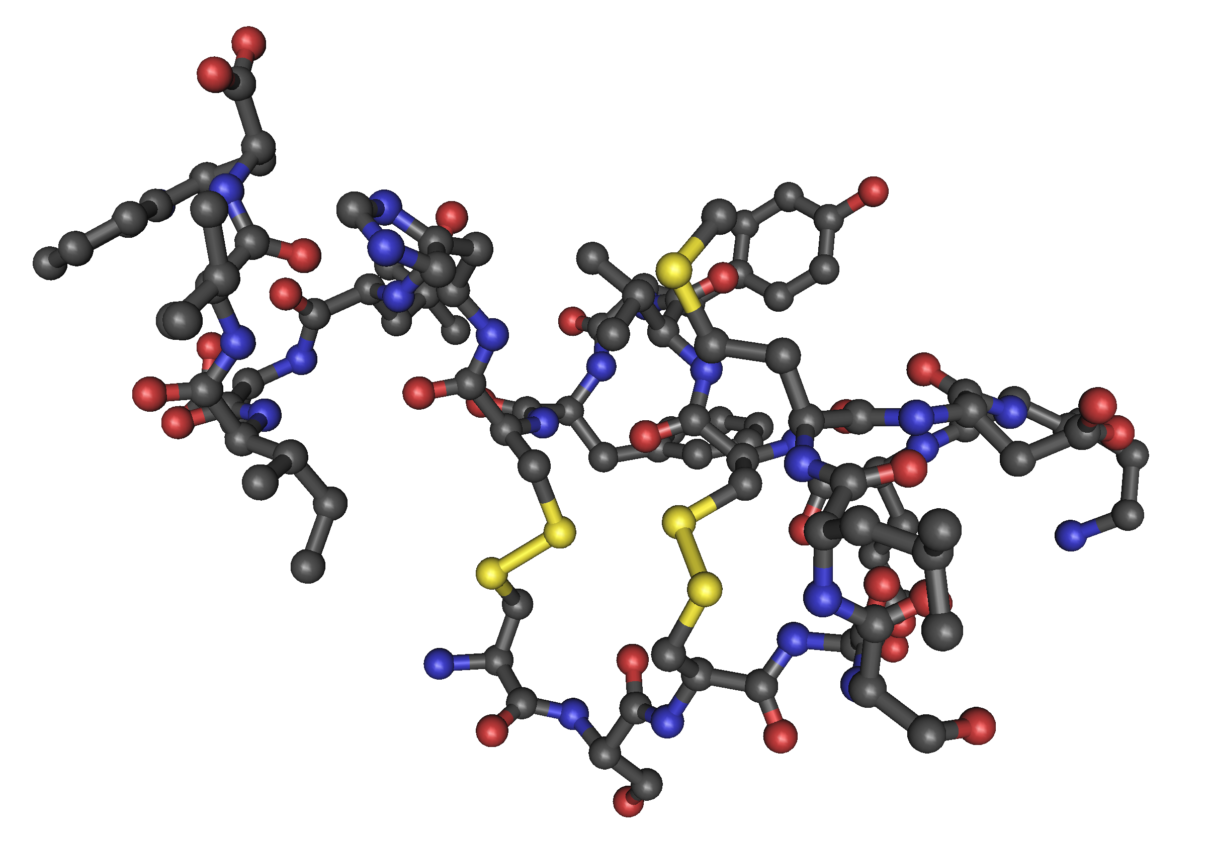 1EDN_human_endothelin